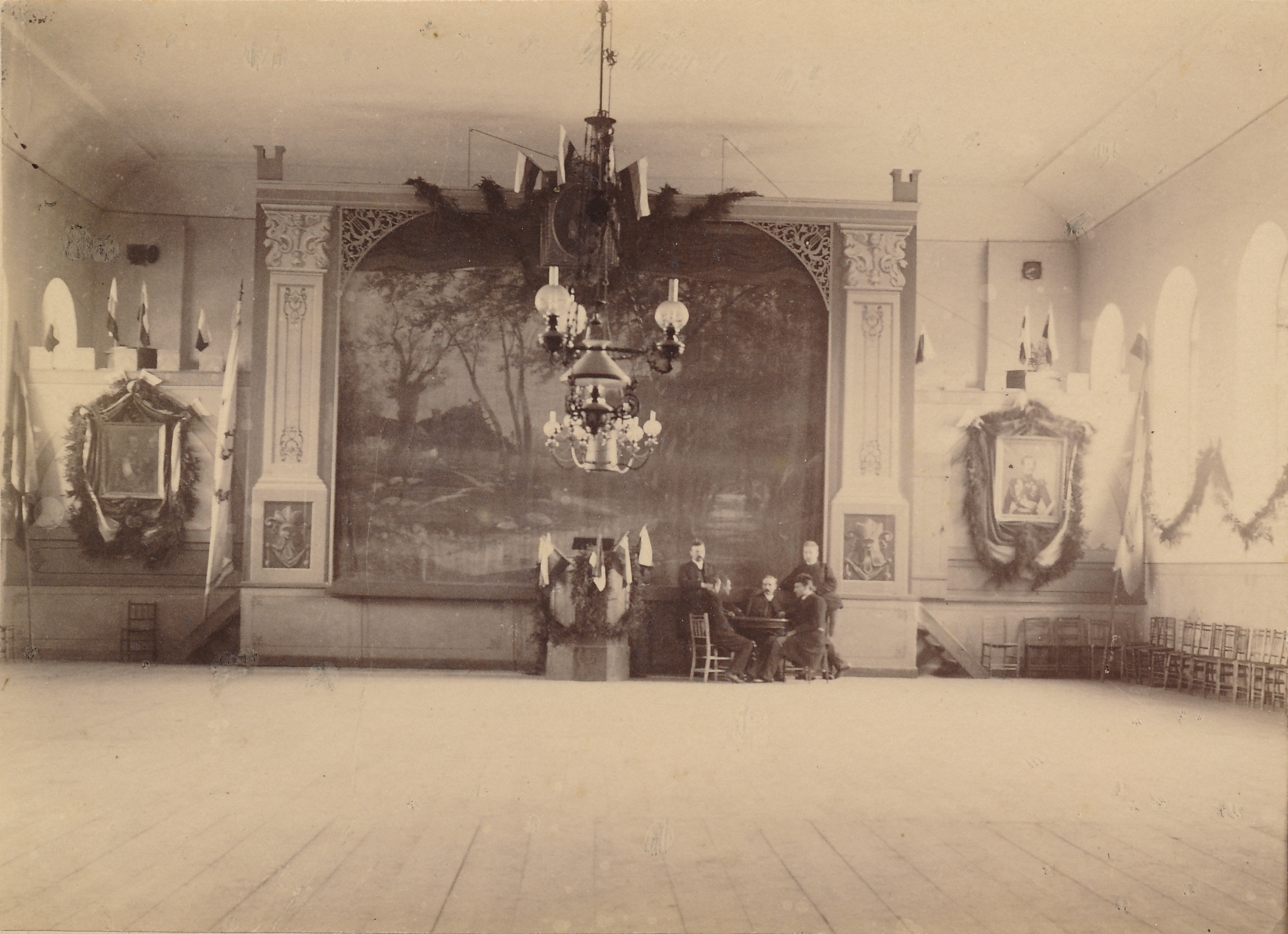 Viljandi Eesti Põllumeeste seltsi saal, 1882